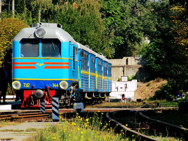 Поезд на станции Жовтнева